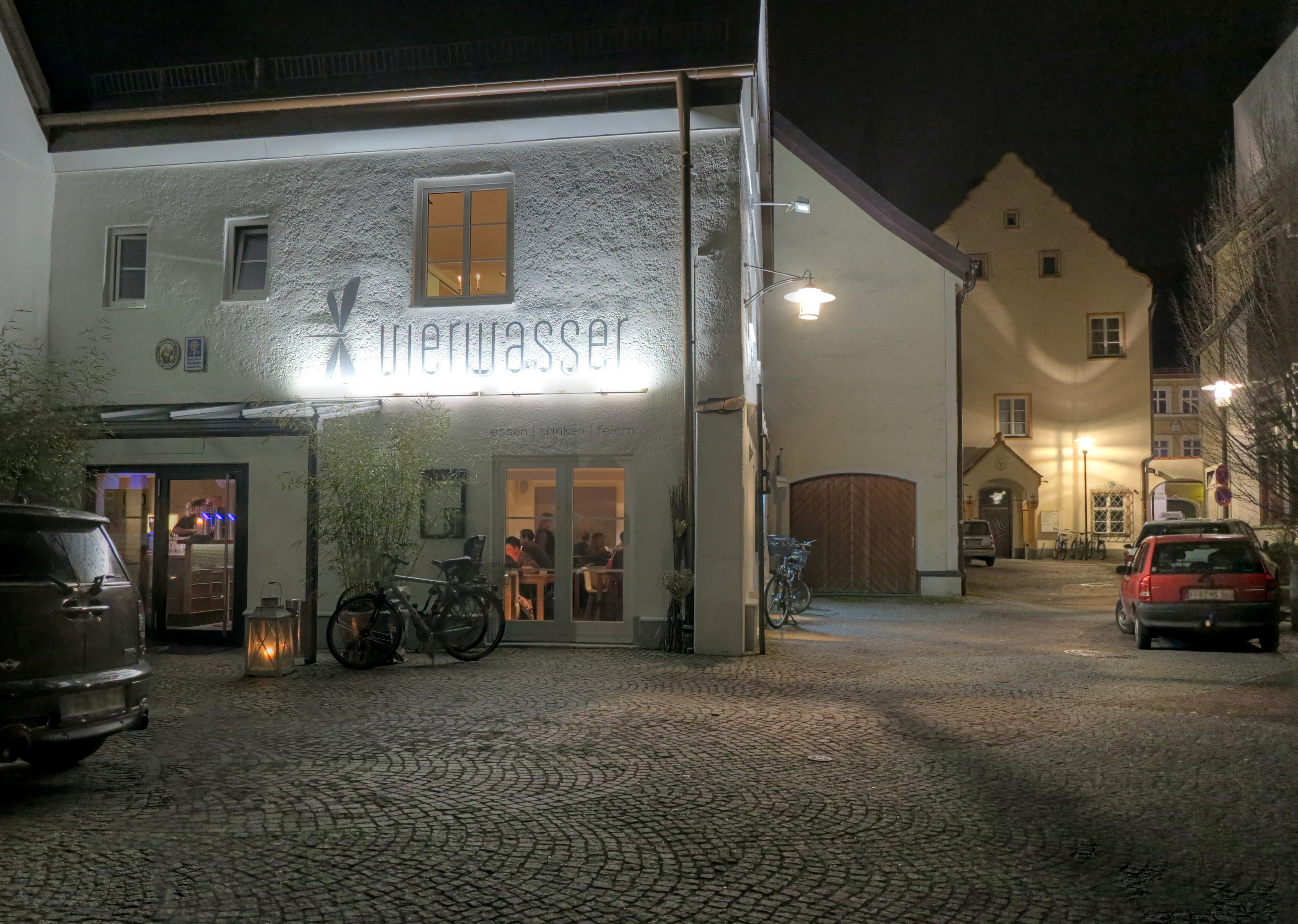 Deutschland, Bayern, Füstenfeldbruck, Altstadt, HDR-Bild, rechts: Sparkasse, mitte: altes Rathaus, links: Restaurant